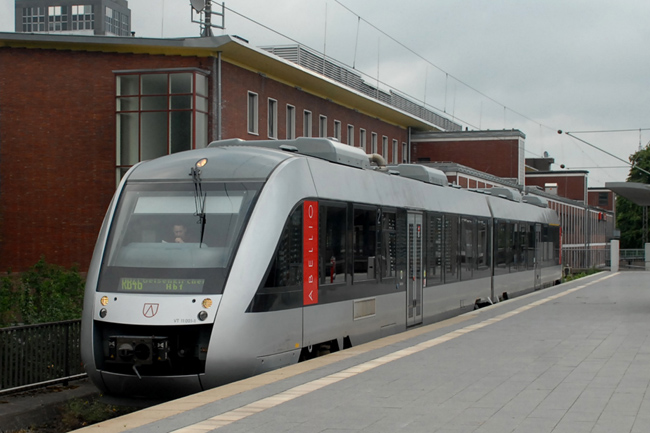 Abellio Rail treinstel VT 11.001-1 van het Alstom type Coradia LINT 41 te Bochum Hbf.